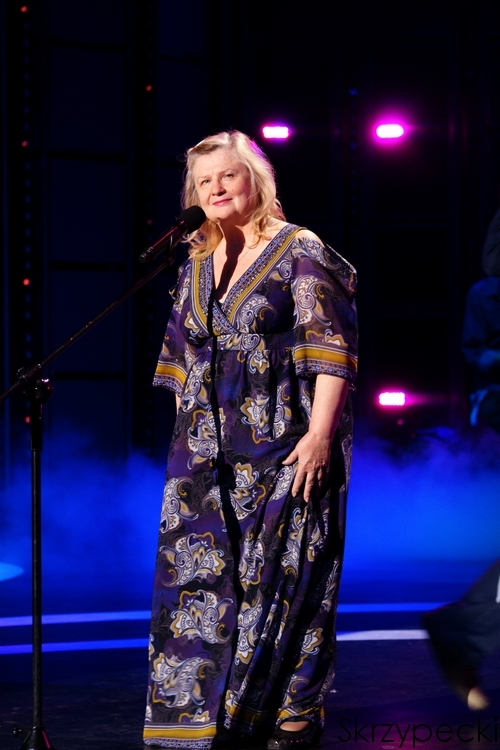 Stanisława Celińska @ 46. KFPP in Opole.